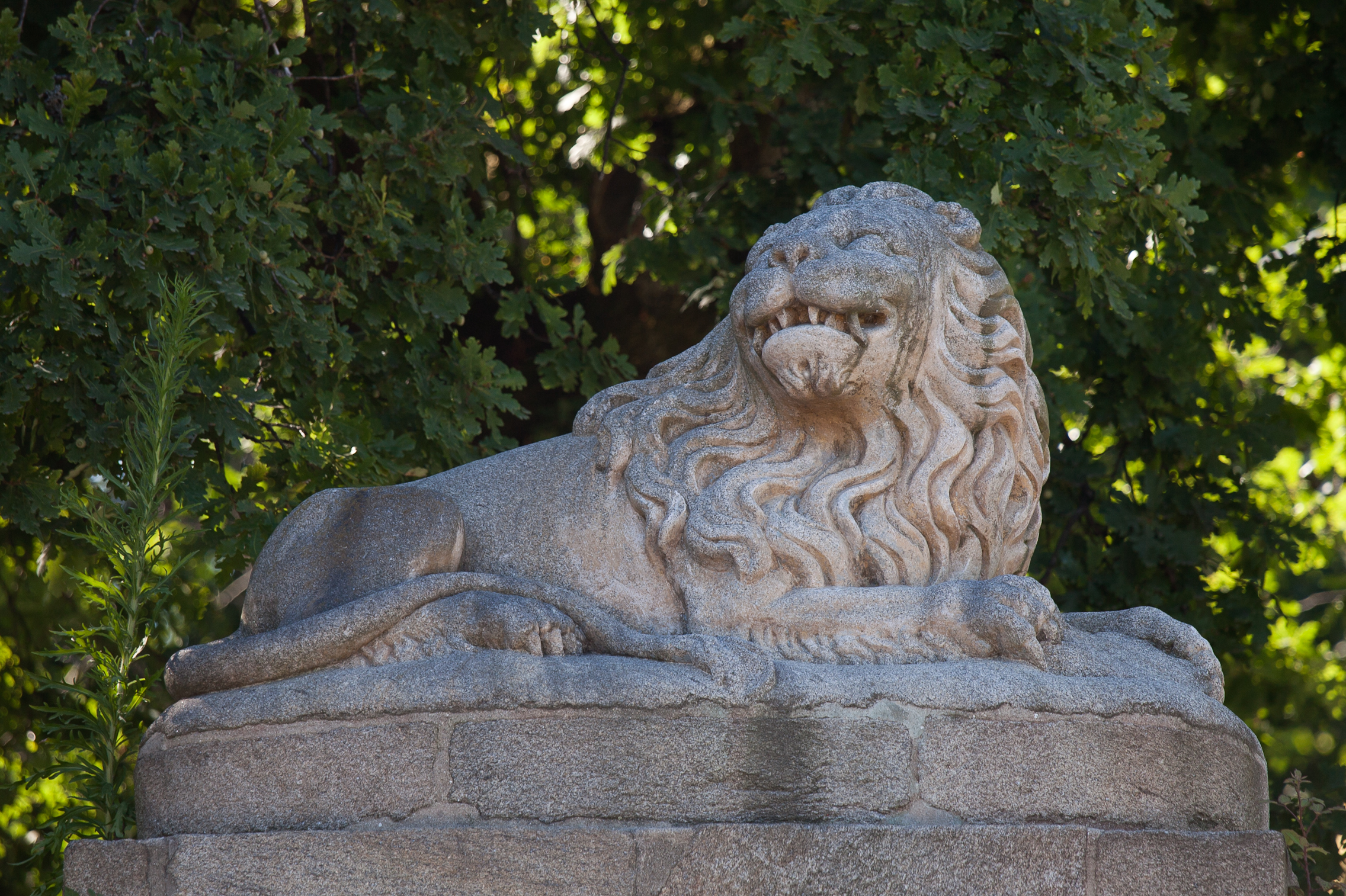 Paseo dos Leóns. Alameda de Santiago de Compostela, Galicia.